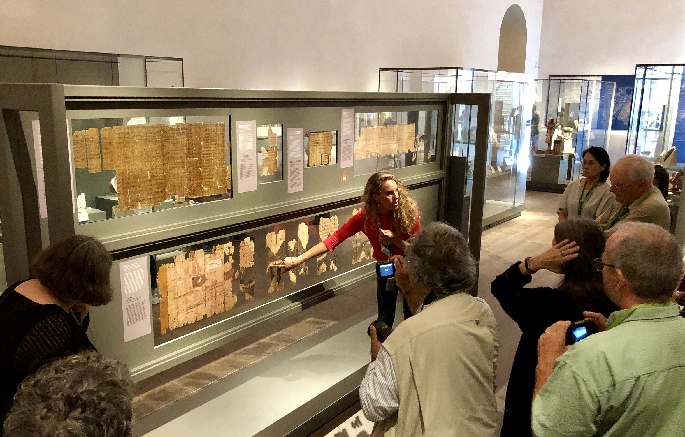 Первая карта с геологической информацией, древний Египет.